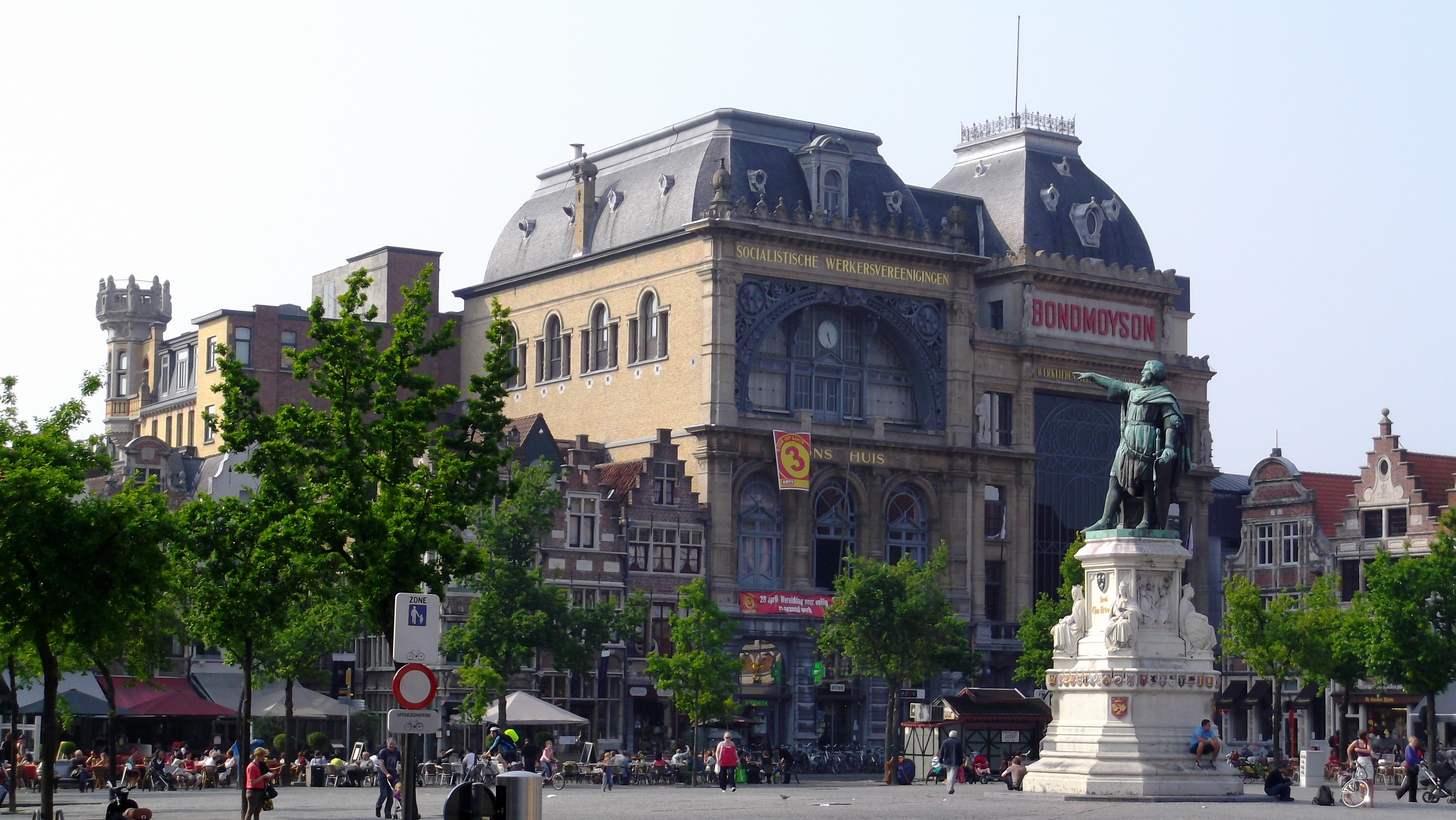 что-то там "социалистическое"